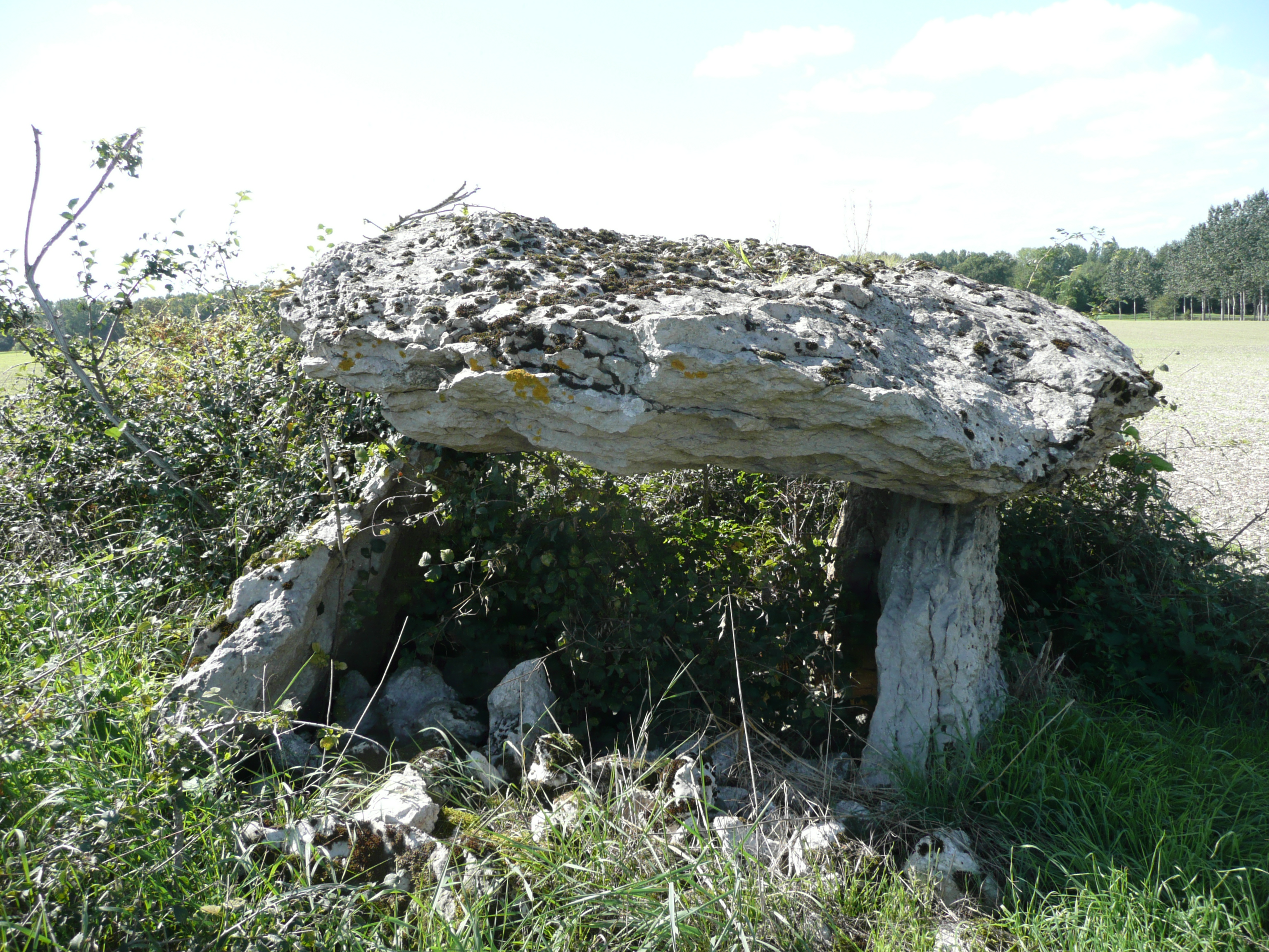 Broc - Dolmen .